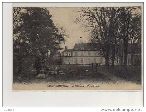 château de Cheptainville